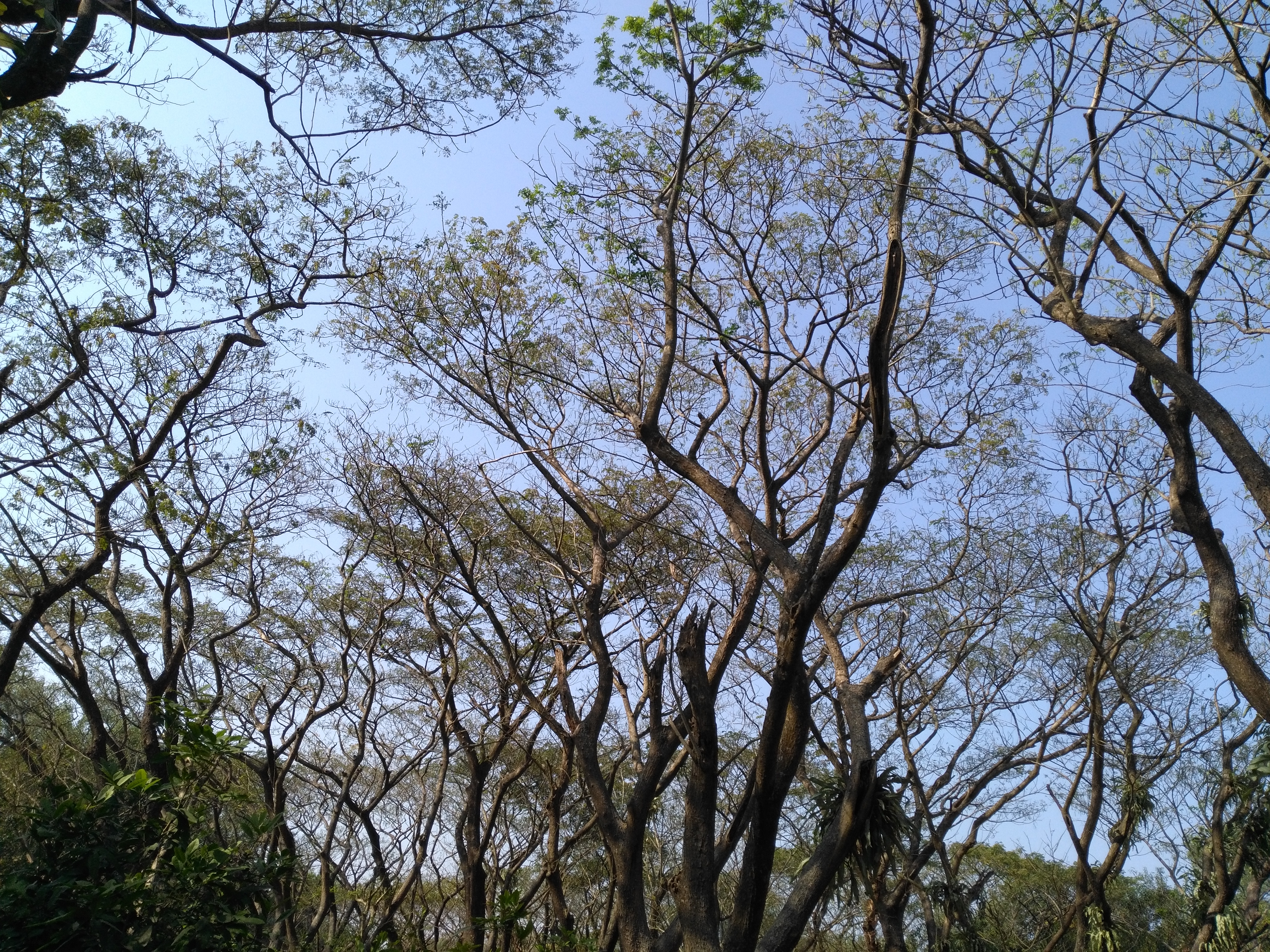 টেংরাগিরি বন্যপ্রাণী অভয়ারণ্য